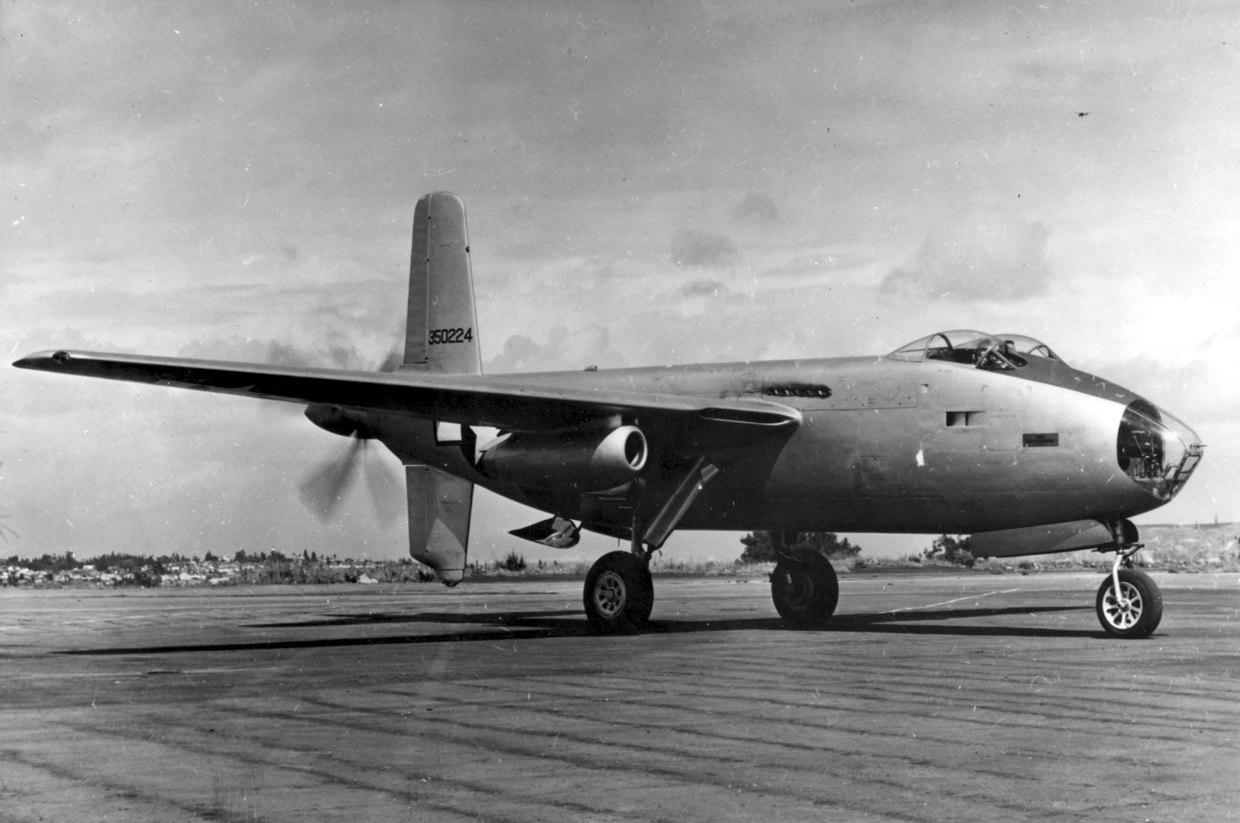 Douglas XB-42 side view